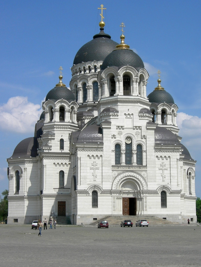 Войсковой Вознесенский Кафедральный собор (3-й вариант). Архитектор А. А. Ященко. 1893—1905 гг. Стиль — нововизантийский. Объект культурного наследия федерального значения. Является третьим по величине православным храмом в России. Собор в Новочеркасске пытались возвести с момента основания города, но он дважды обрушался (в 1846 и 1863 году). Здесь захоронены останки М. И. Платова, В. В. Орлова-Денисова, И. Е. Ефремова, Я. П. Бакланова.